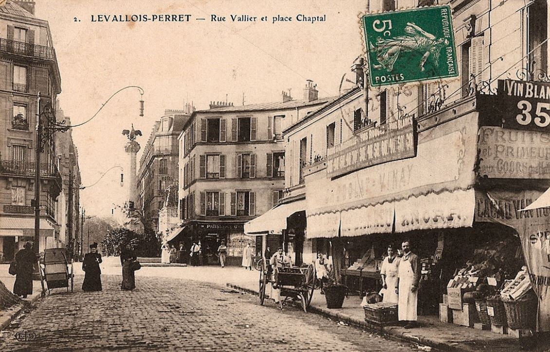 Levallois-Perret. Rue Vallier (devenue rue Louise-Michel). Place Chaptal (devenue place du Maréchal-de-Lattre-de-Tassigny)